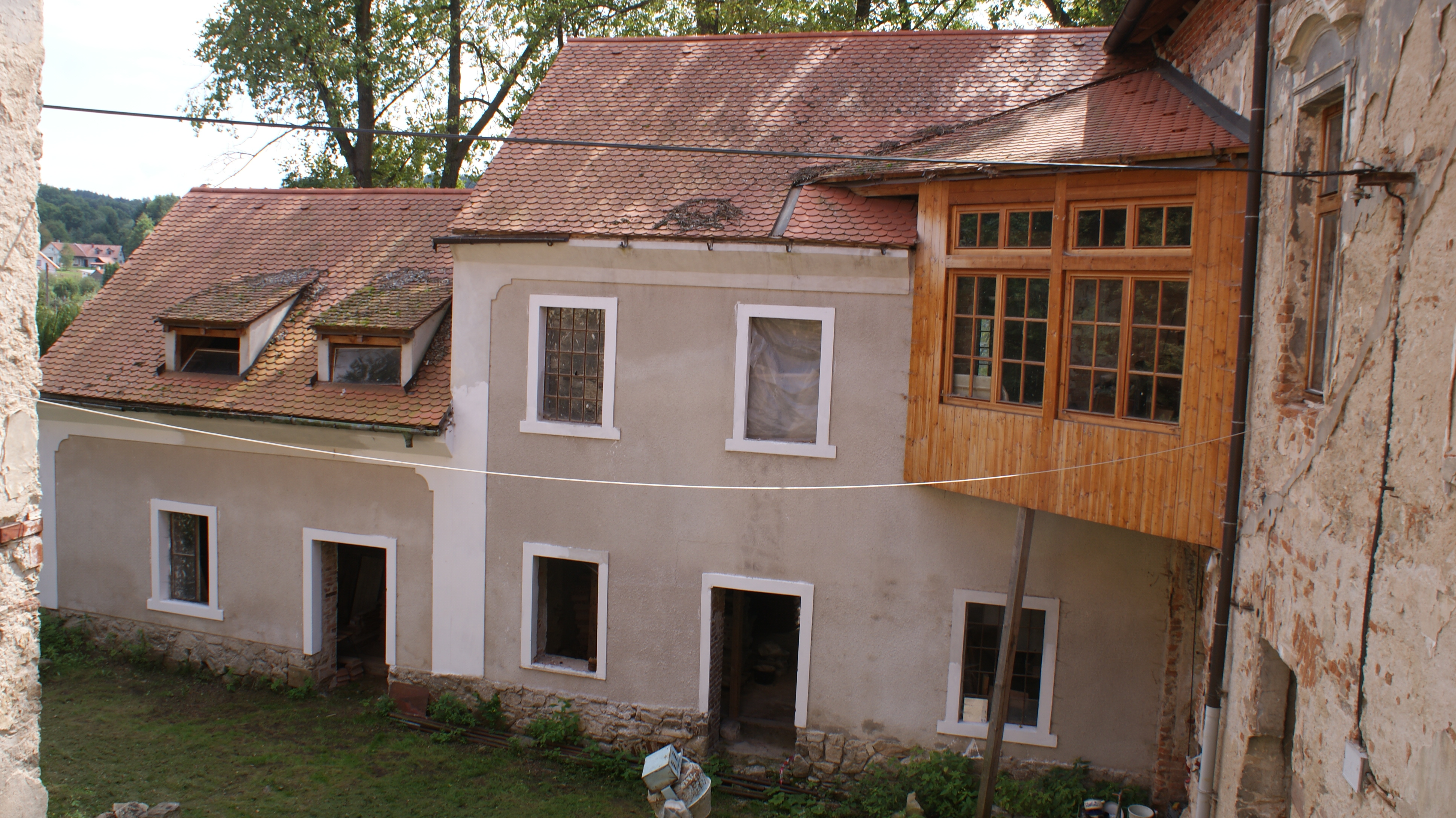 Tvrz Popovice je vynikající ukázkou vývoje panského sídla od tvrze k renesančnímu a baroknímu zámečku. Význam zvyšuje fakt, že je jednou z mála dochovaných vodních tvrzí v ČR. Nejhodnotnější částí je věž, na jejíž obnovu je zaměřena navržená akce. Tvrz je situována v centru Popovic, část jejího obranného systému tvořil Mlýnský rybník. Vodní příkop chránící tvrz ze směru k centru obce se nedochoval, v portálu brány jej prokazují otvory pro řetězy padacího mostu. Půdorysnou dispozici tvrze tvoří 3 křídla přiléhající k sobě tupými úhly. Renesanční úpravy připomínají fragmenty sgrafitové výzdoby fasády. V rohových pokojích situovaných na severovýchod (přízemí i 1. poschodí) jsou stropy sklenuté hřebínkovou klenbou. Na jižní křídlo směrem k rybníku navazuje již snesené novodobá patrová přístavba z 19. století využívaná pro lihovarnickou výrobu. Tvrz je dokladem vývoje Popovic od 13. století. Jako nejstarší známý pán tvrze je doložen v roce 1358 Otík z Popovic; zmínka dokládá i farní kostel sv. Jakuba Většího. Významný rozvoj Popovice (i tvrz a sousedící kostel) zaznamenaly v době působení Rytířského řádu křížovníků s červenou hvězdou. Tvrz je pohledově exponovaná ze všech směrů přístupu. Spolu s rekonstruovaným a restaurovaným kostelem sv. Jakuba Většího dokládá původní historické centrum obce. Turistický význam tvrze prokazuje napojení na turistické a cykloturistické trasy. O významu tvrze svědčí, že její stavebně historický a architektonický rozbor je obsažen ve významných odborných lexikonech a monografiích. Nejaktuálnější jsou výsledky výzkumu Doc. Ing. Michaela Rykla z Fakulty architektury ČVUT v Praze a dokumentace Národního památkového ústavu v Praze.